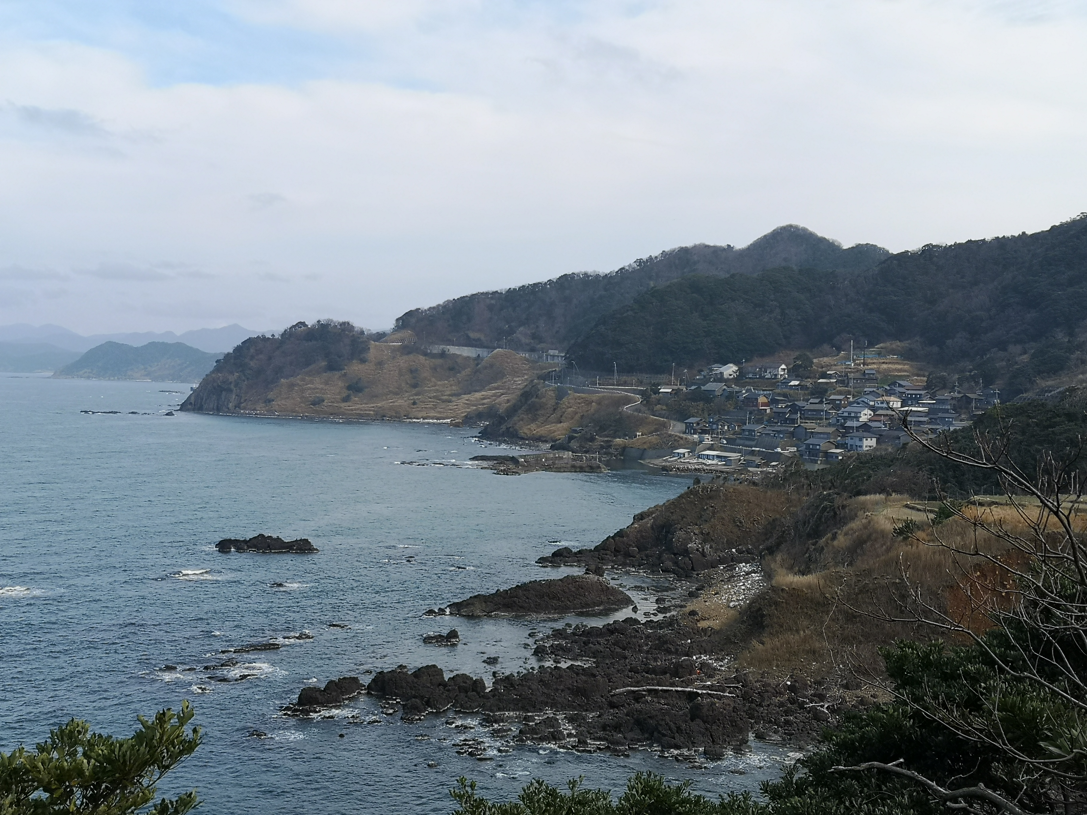 塩江方面から臨む京丹後市網野町磯